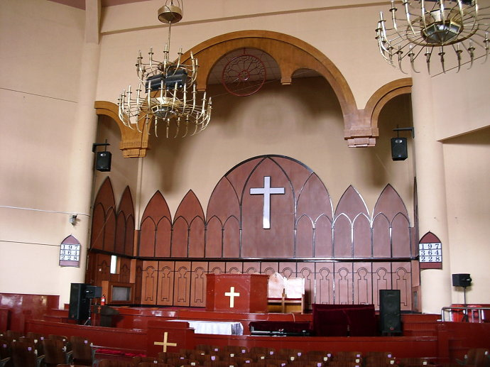 天津基督教协会山西路堂外景